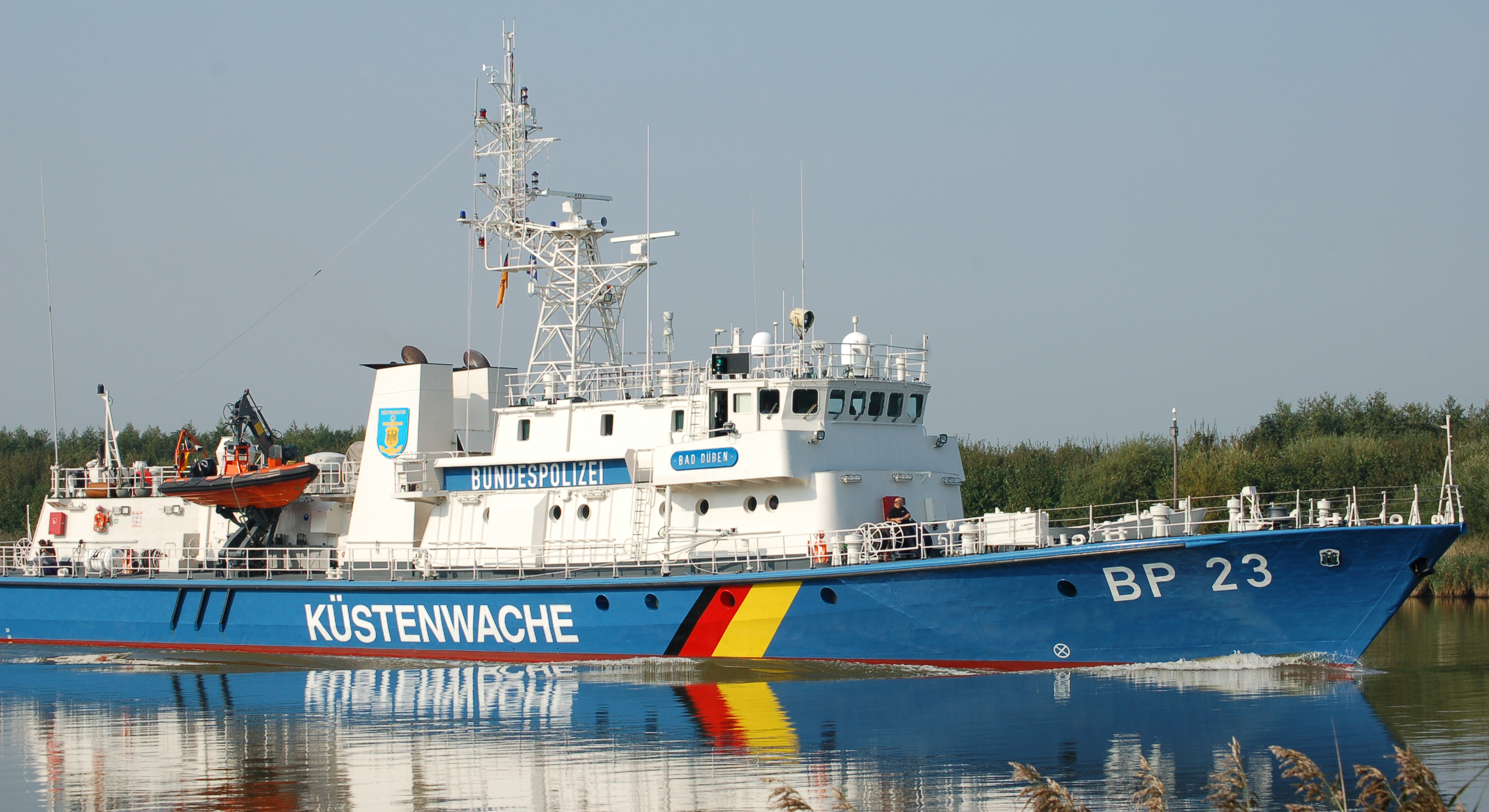 Küstenwachschiff "Bad Düben" auf dem Nord-Ostsee-Kanal